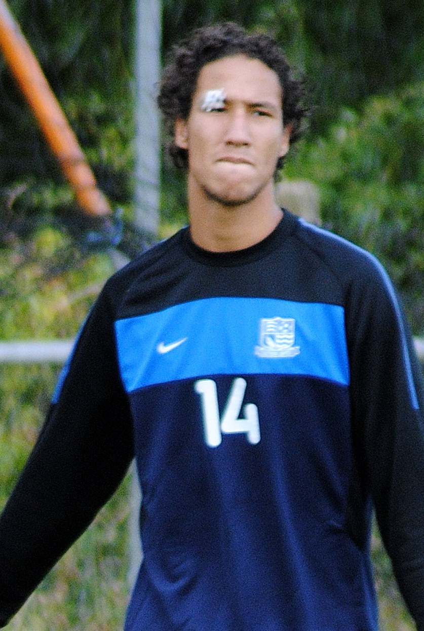 Bilel Mohsni portant les couleurs de Southend United